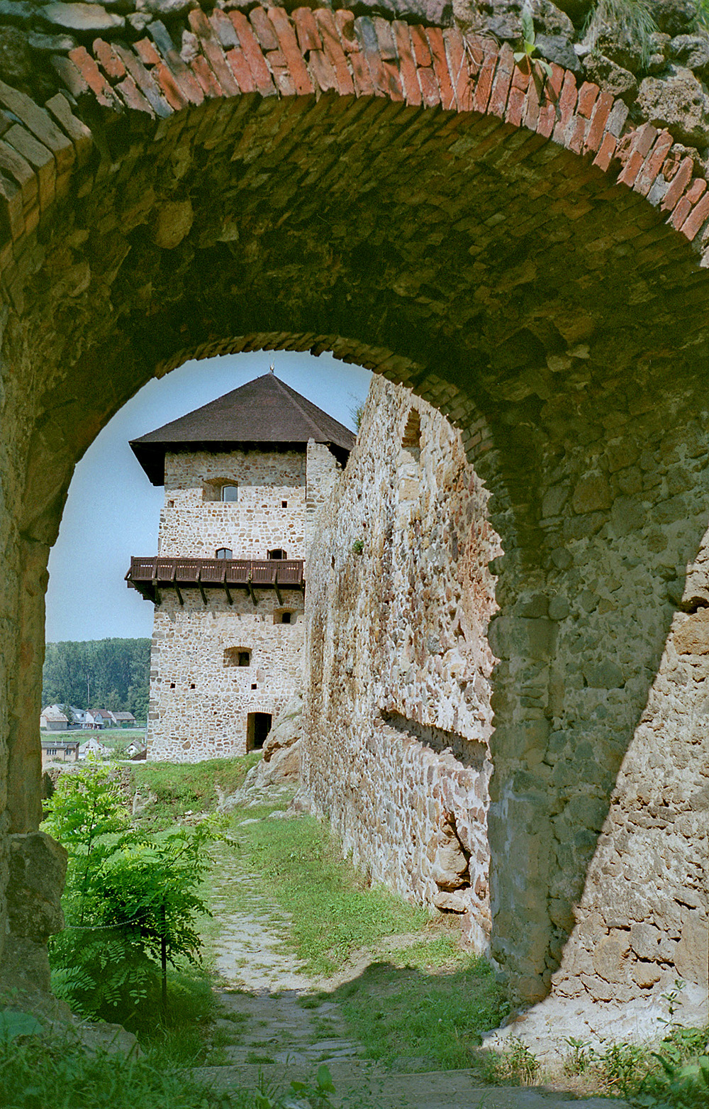 Veža i.